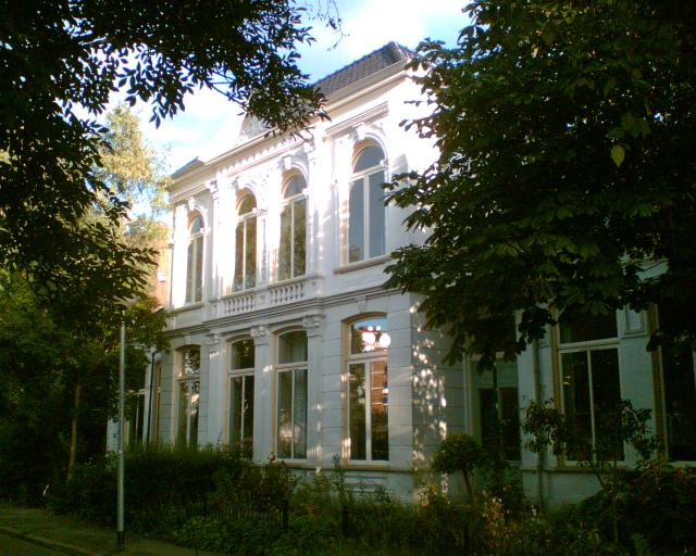 Het Witte Huis, een vrijstaand dubbel herenhuis aan de Viaductstraat in Groningen, dat in 1995 werd aangewezen tot Rijksmonument.